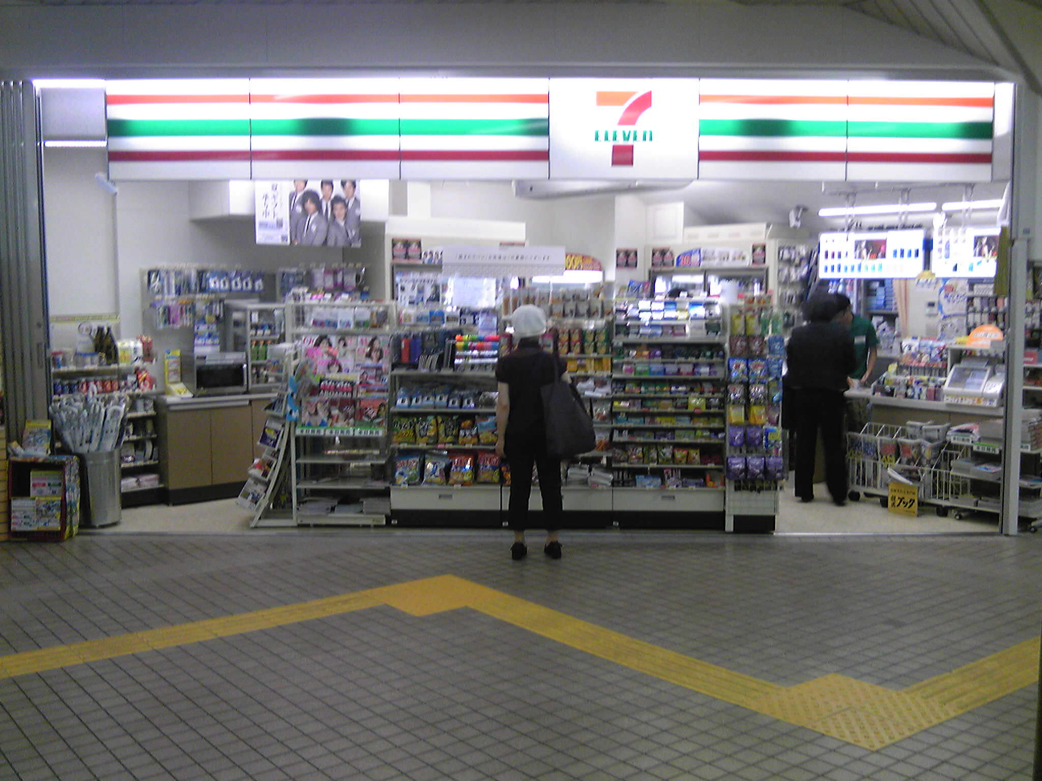 セブン－イレブン福岡市地下鉄貝塚駅店（福岡市東区）